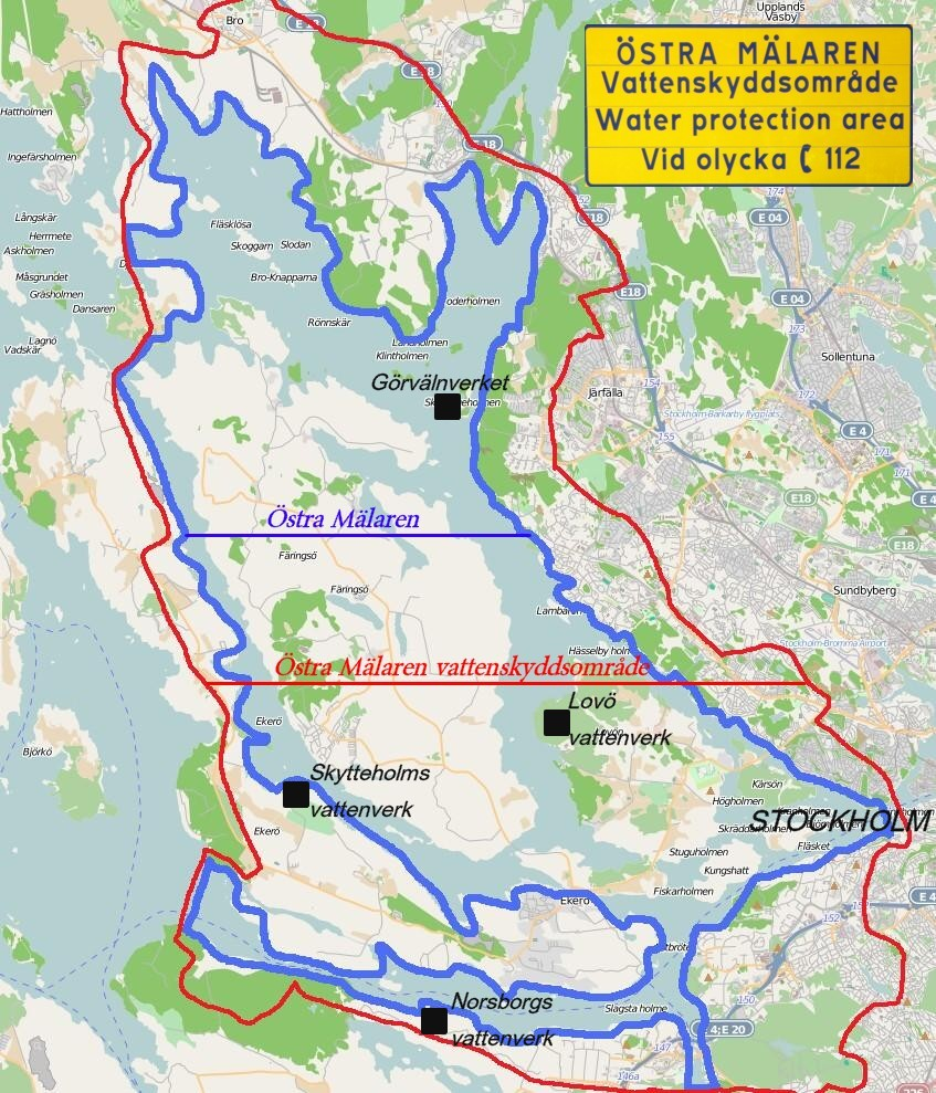 Östra Mälarens vattenskyddsområde och Östra Mälarens vattenverk, källa: Stockholm Vatten om Östra Mälarens vattenskyddsområde This map may be incomplete, and may contain errors. Don't rely solely on it for navigation.